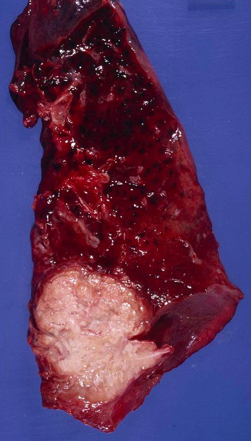 Metastatic colonic adenocarcinoma